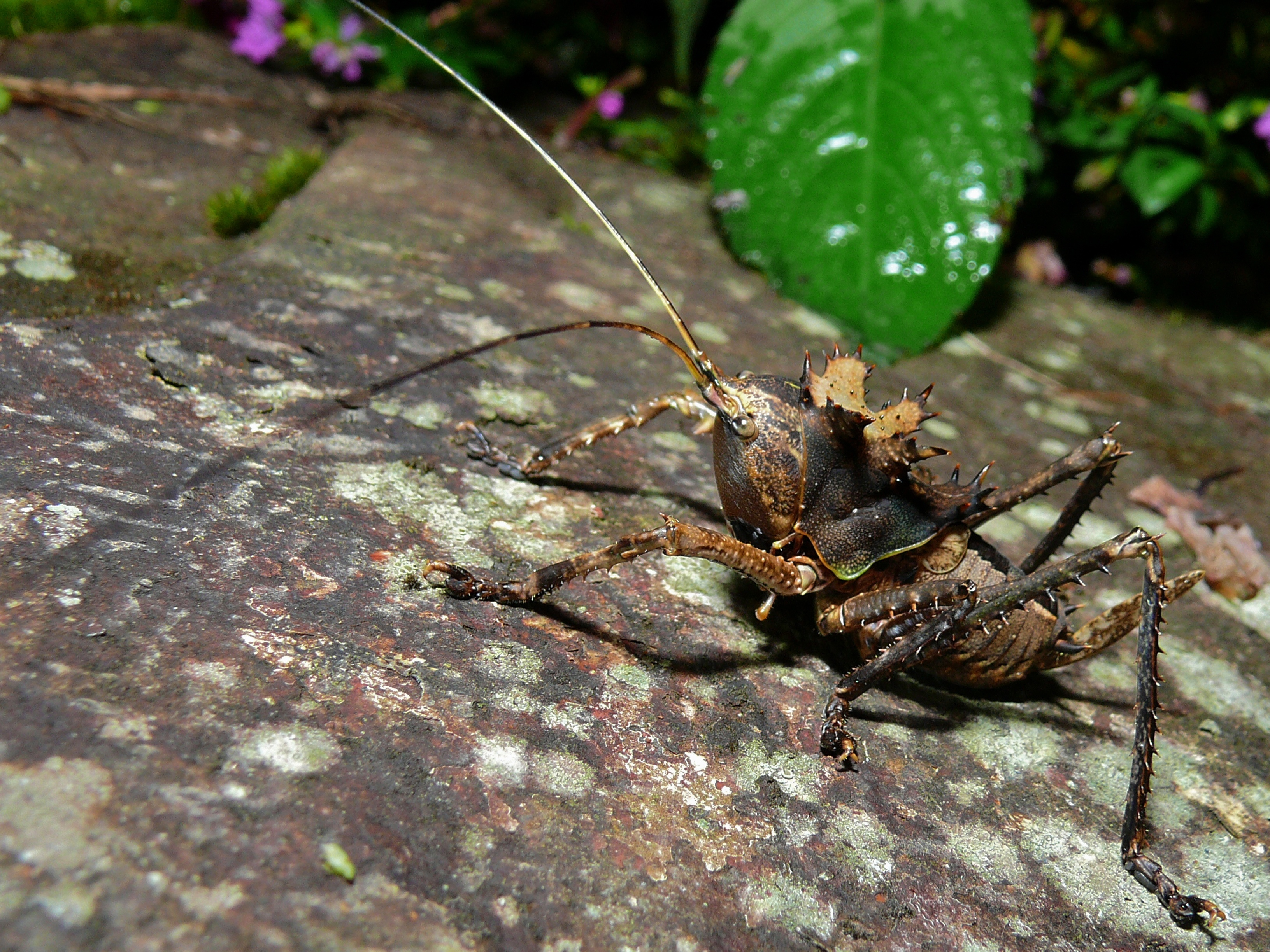 Mount Kinabalu NP, Sabah, MALAYSIA